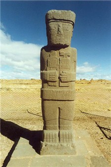 beeld in Tihuanaco van Robert Beunder